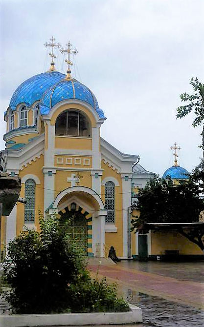 Свято-Успенский собор Махачкалы Авар: МахІачхъалаялъул "Свято-Успенский" абулеб килиса